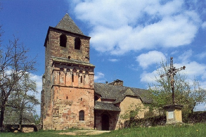 Église Saint-Pierre de Bessuéjouls.